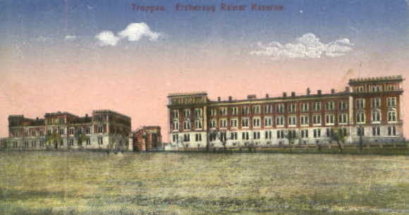 Erzherog Rainer Kaserne in Troppau